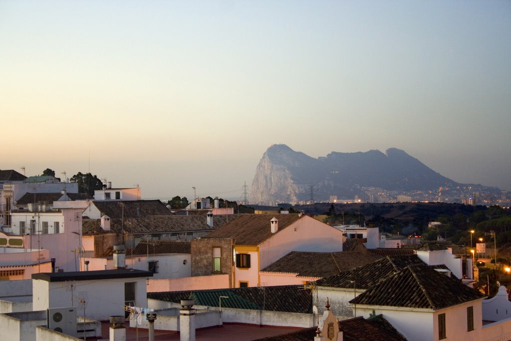 Vista de San Roque con el Peñón de Gibraltar al fondo.